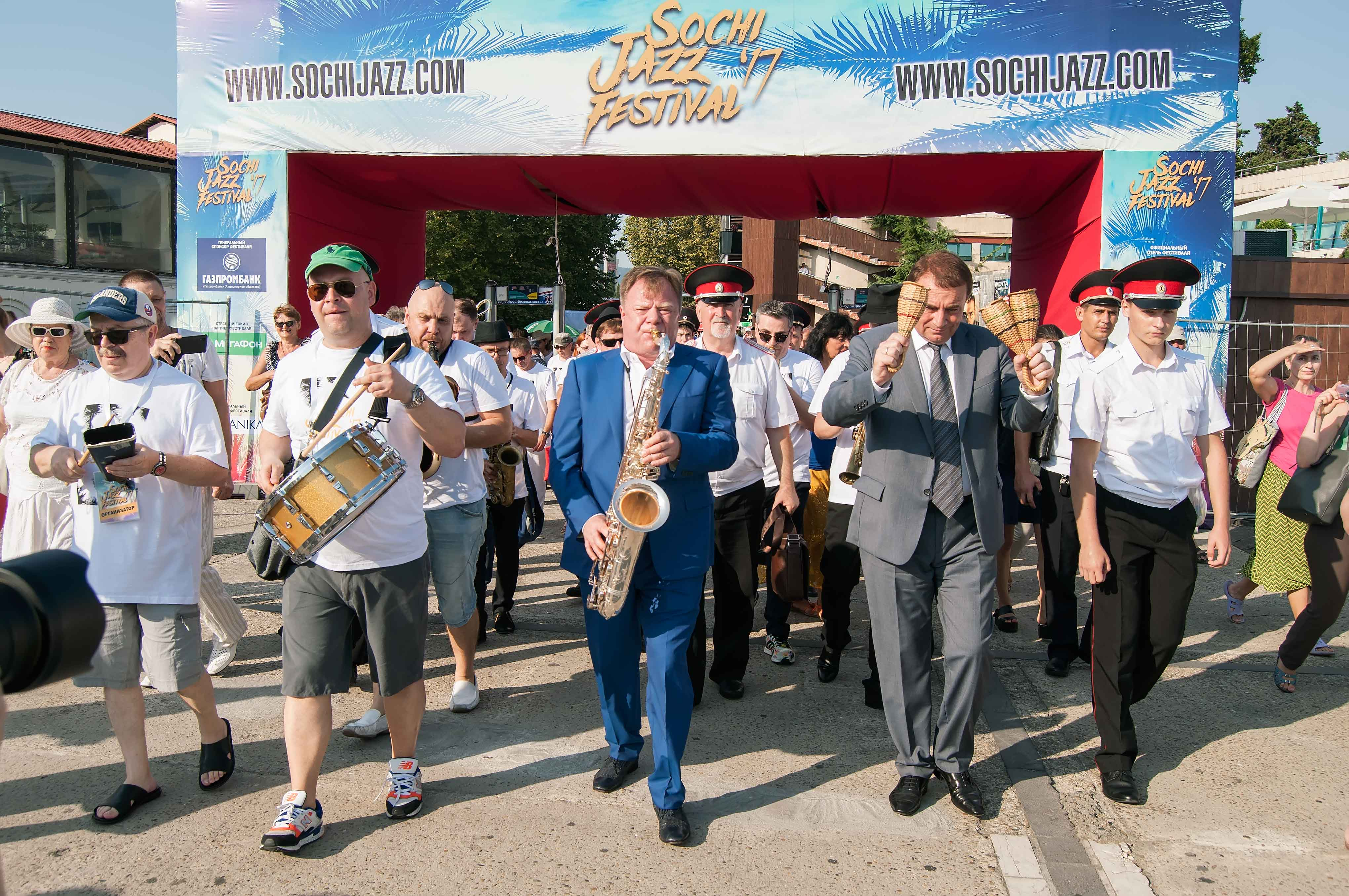 Сочи Джаз Фестиваль